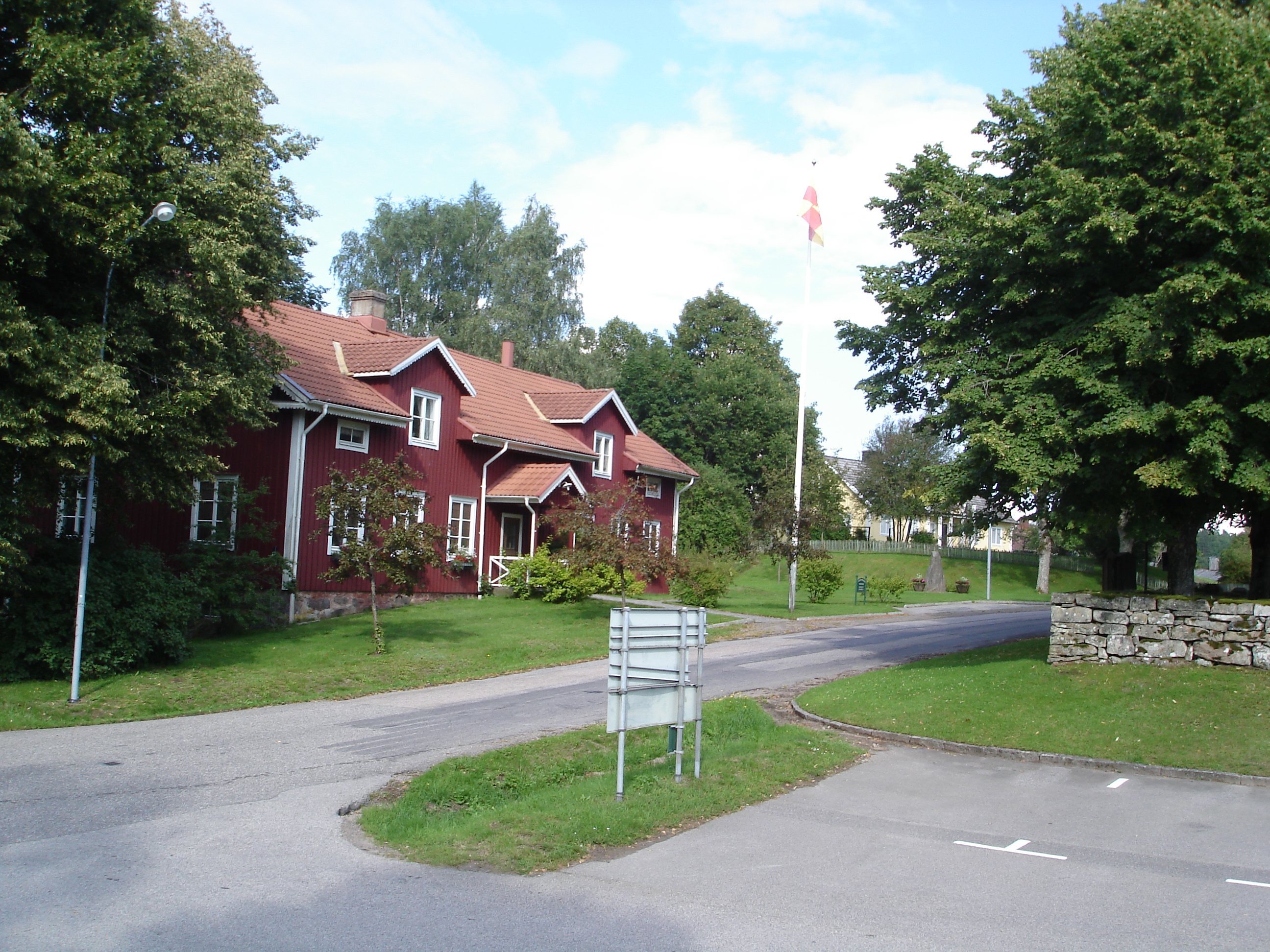 Gebäude neben der Kirche